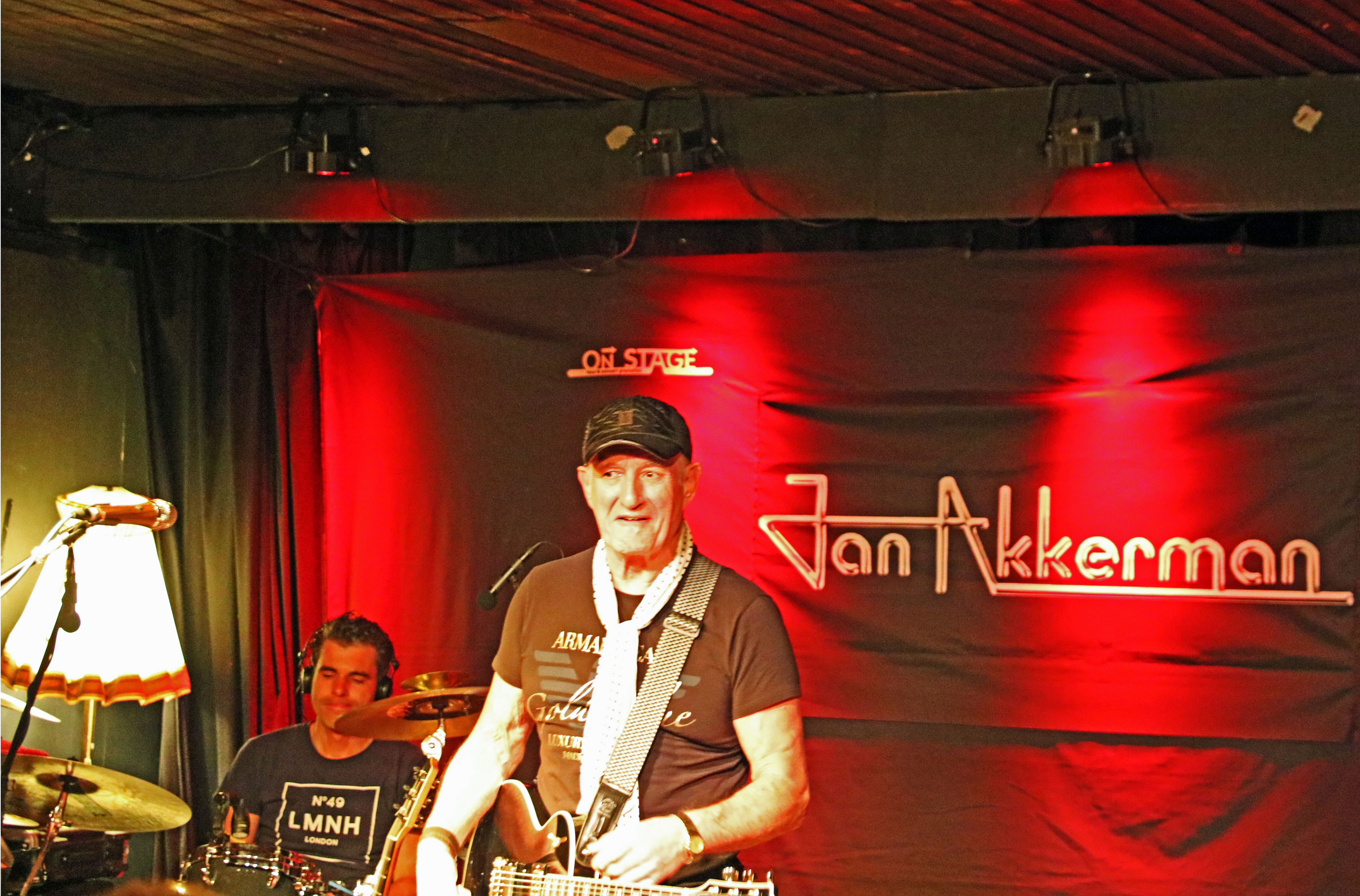 Jan Akkkerman bei einem Konzert in der Fürthr Kofferfabrik